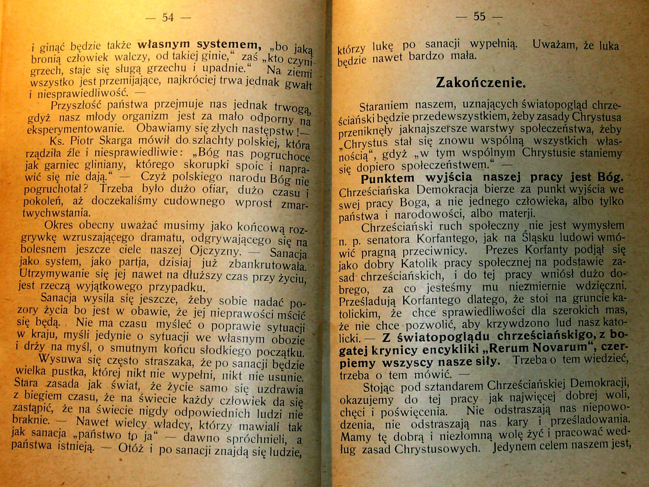 Stanisław Krzyżowski, Rozmyślania w czterdziestą rocznicę encykliki „Rerum novarum”, wydanej 15 maja 1891 r. przez papieża Leona XIII, Pszczyna 1931